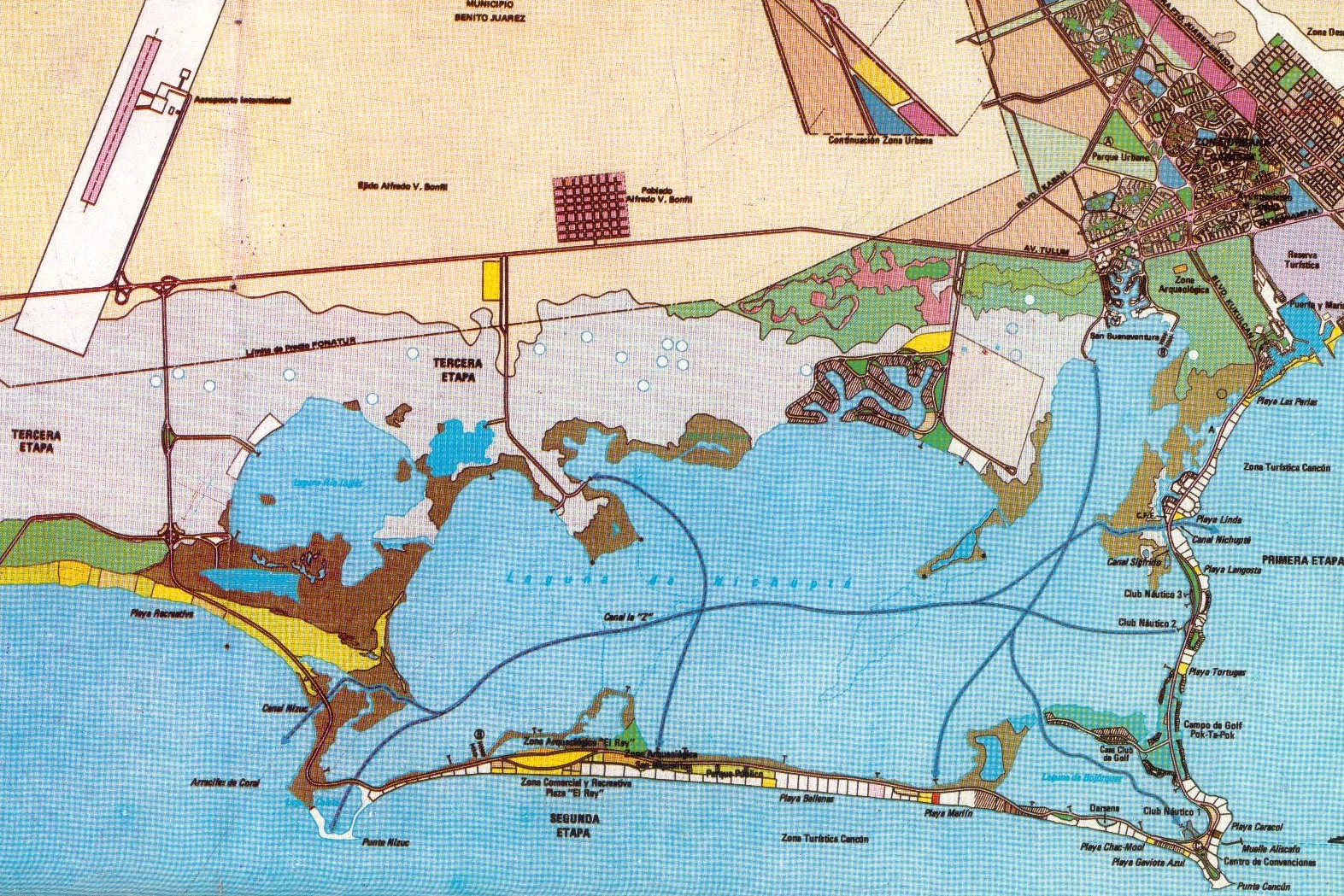 Plan Maestro de Infratur para la Zona Hotelera y Urbana